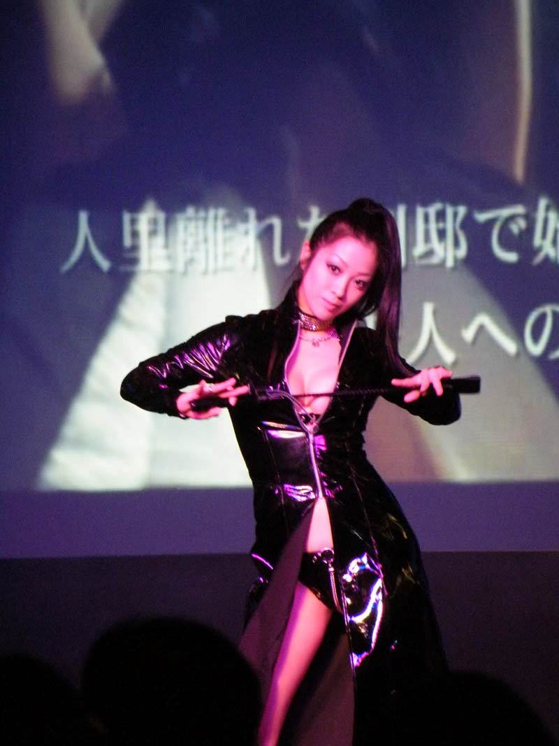 Komukai Minako (小向美奈子) at ASIA ADULT EXPO 2010